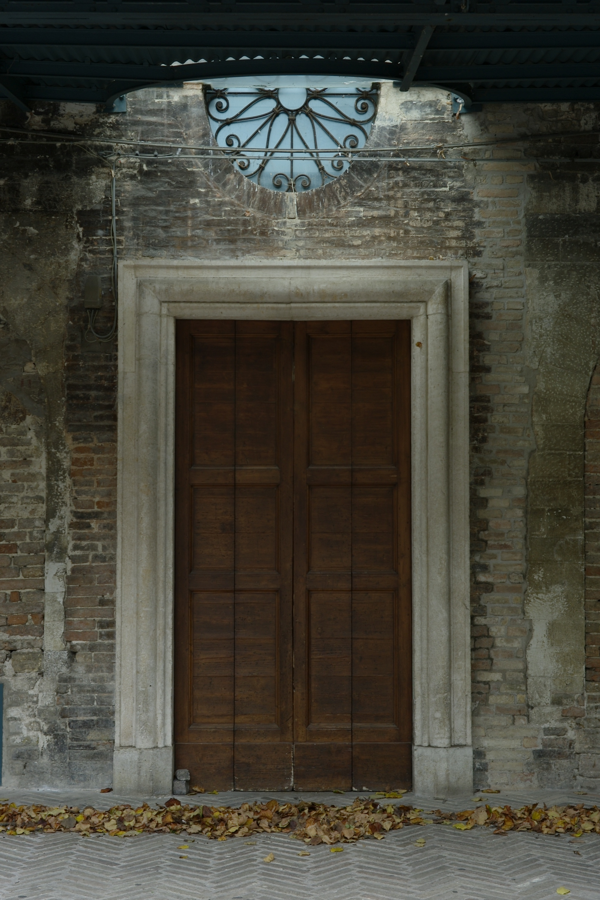 Il portale della Cappella Albani nel Convento di San Francesco, in Urbino.